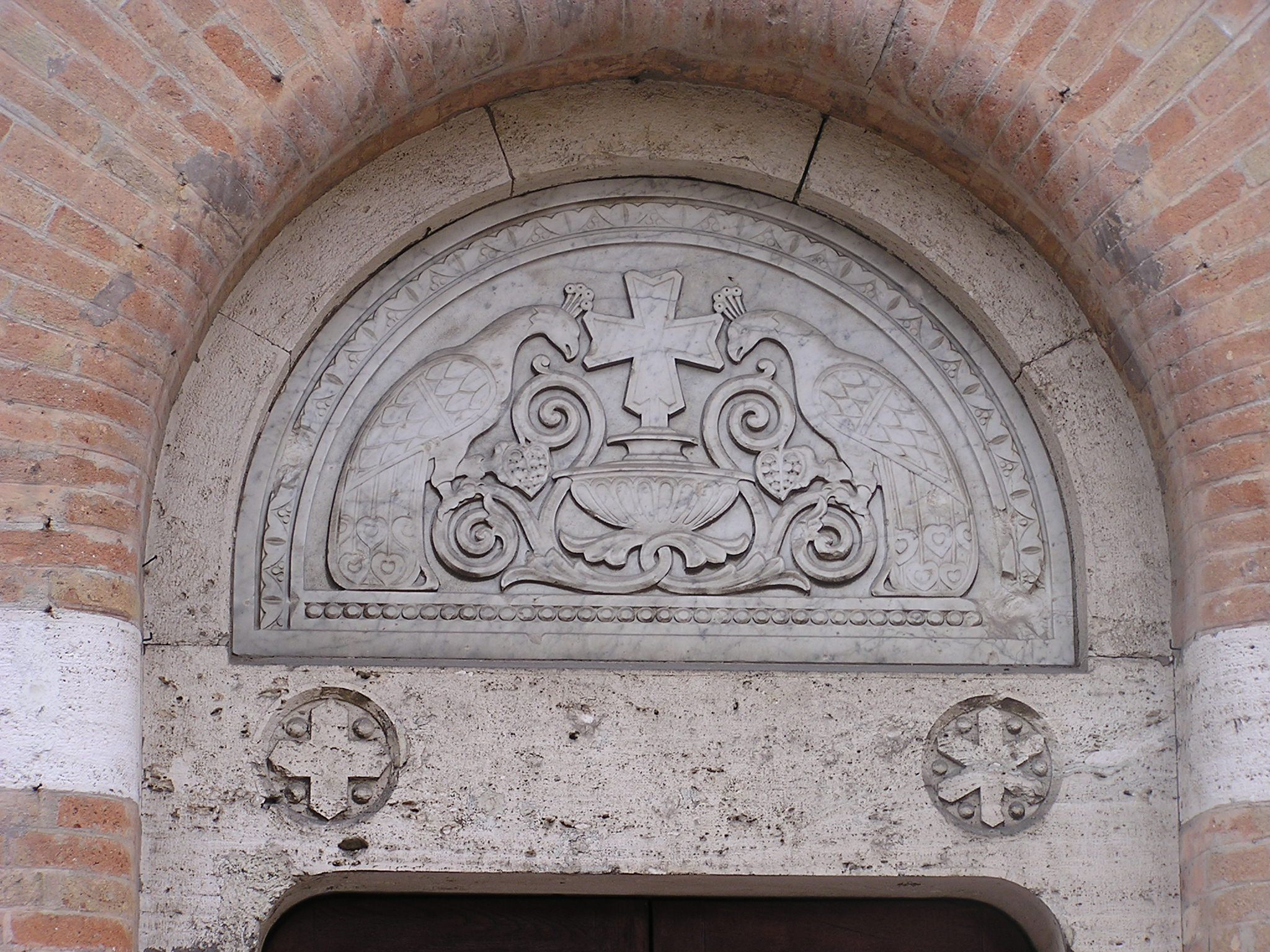 Scultura di Vittorio Merelli nella Chiesa della Sacra Famiglia